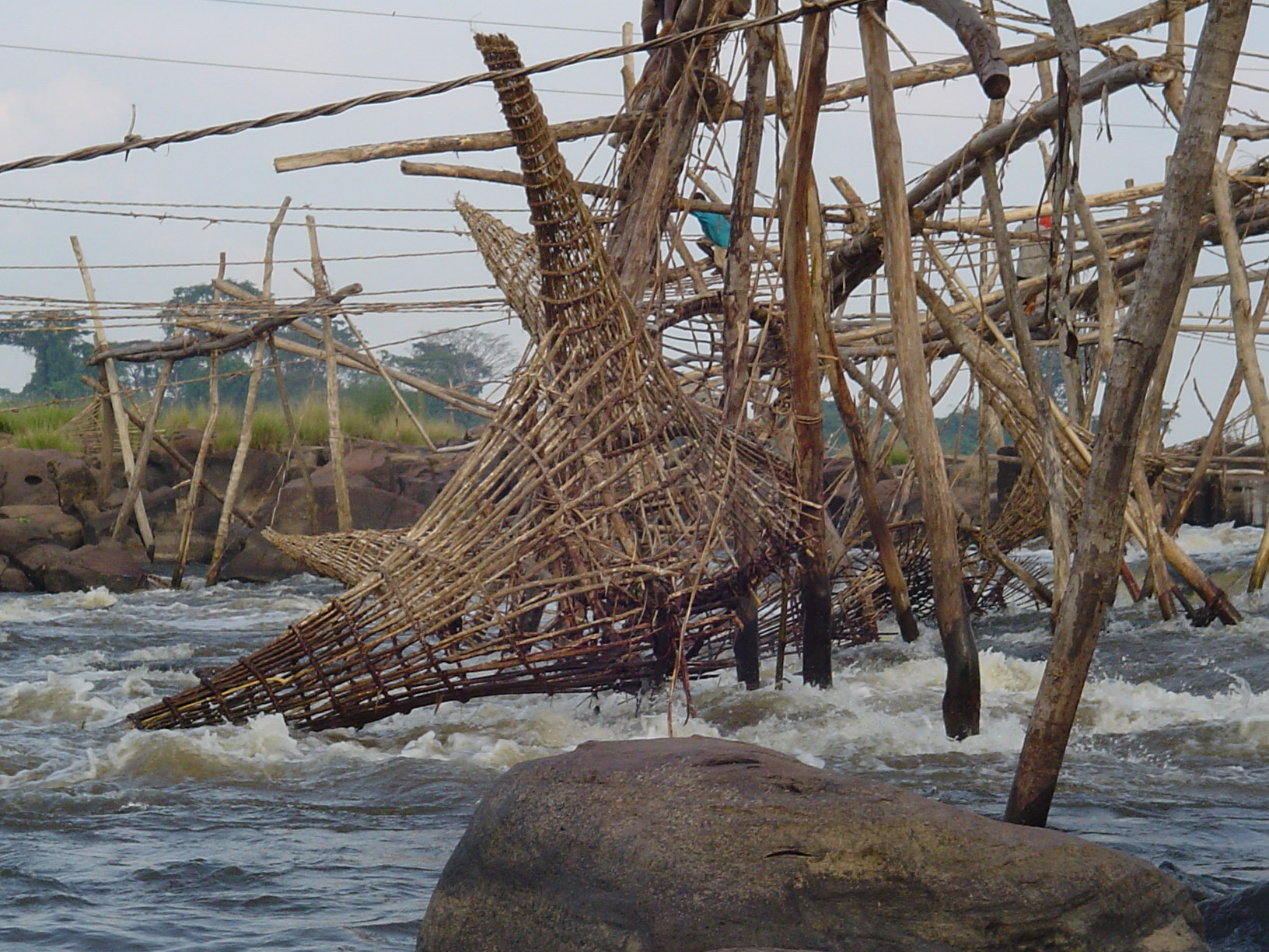 Foto scattata da me stesso delle rapide di Wagenya, mentre ero in visita a Kisangani